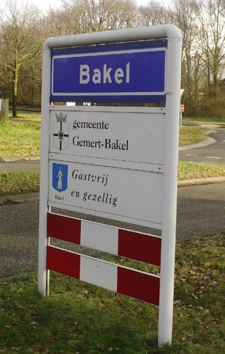 Plaatsnaam bord aan rotonde bij de Aarle-Rixtelseweg